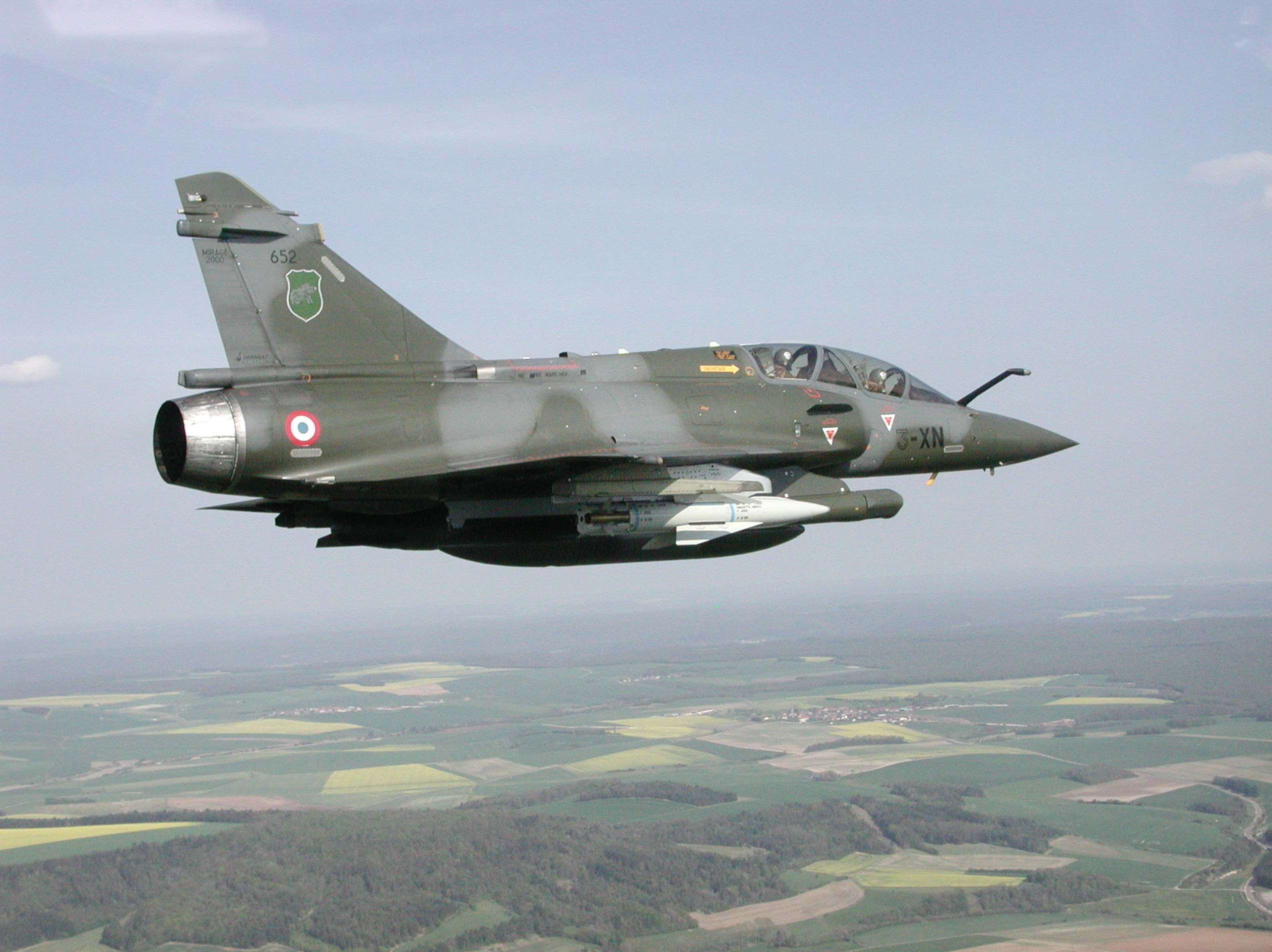 Mirage 2000D avec AS30L